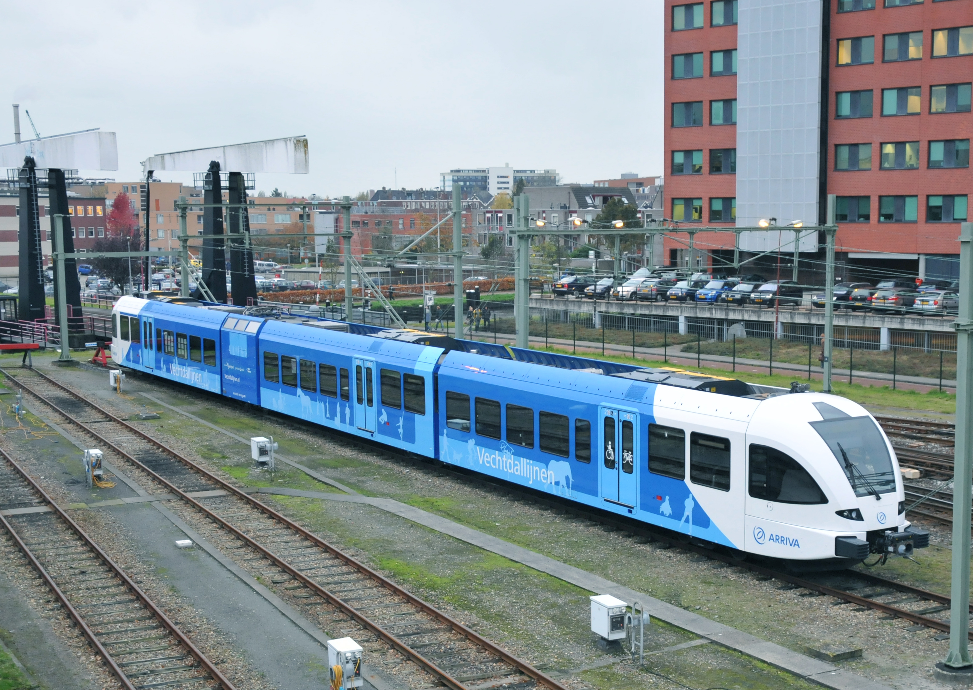 Arriva treinstel 10.517 van het type Stadler Rail type GTW te Groningen. UIC nummer: 94 84 4 011 517-8 NL-ARN